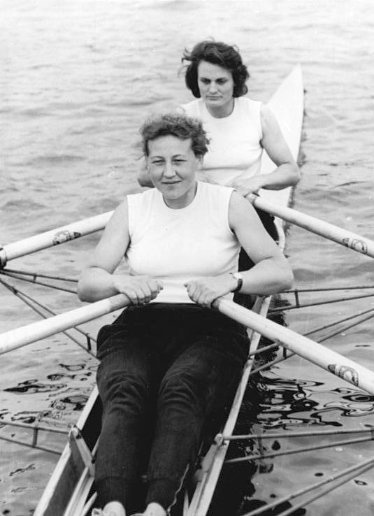 Gisela Heisse, Herta Weissig Zentralbild Dressel Non-Ku 29.5.1960 Grünauer Frühjahrsregatta der Ruderer am 29.Mai 1960 Im Riemenzweier (ohne) der Senioren belegte das Boot von der DHfK mit Gisela Heisse (vorn) und Herta Weissig den zweiten Platz.